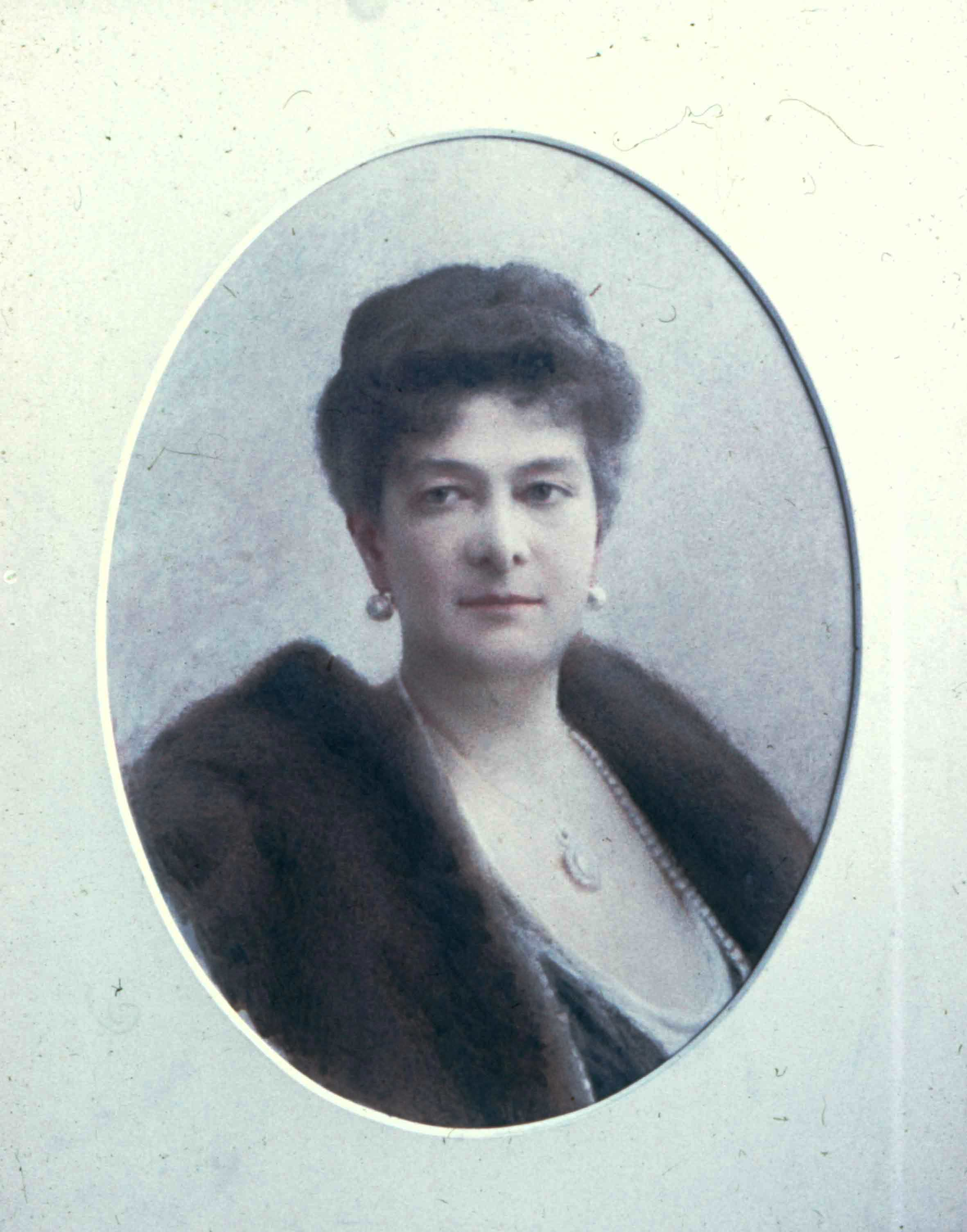 Портрет вел. княгини Марии Павловны, последнего президента императорской Академии художеств. Бум, акв. Выполнен точечной миниатюрной техникой.